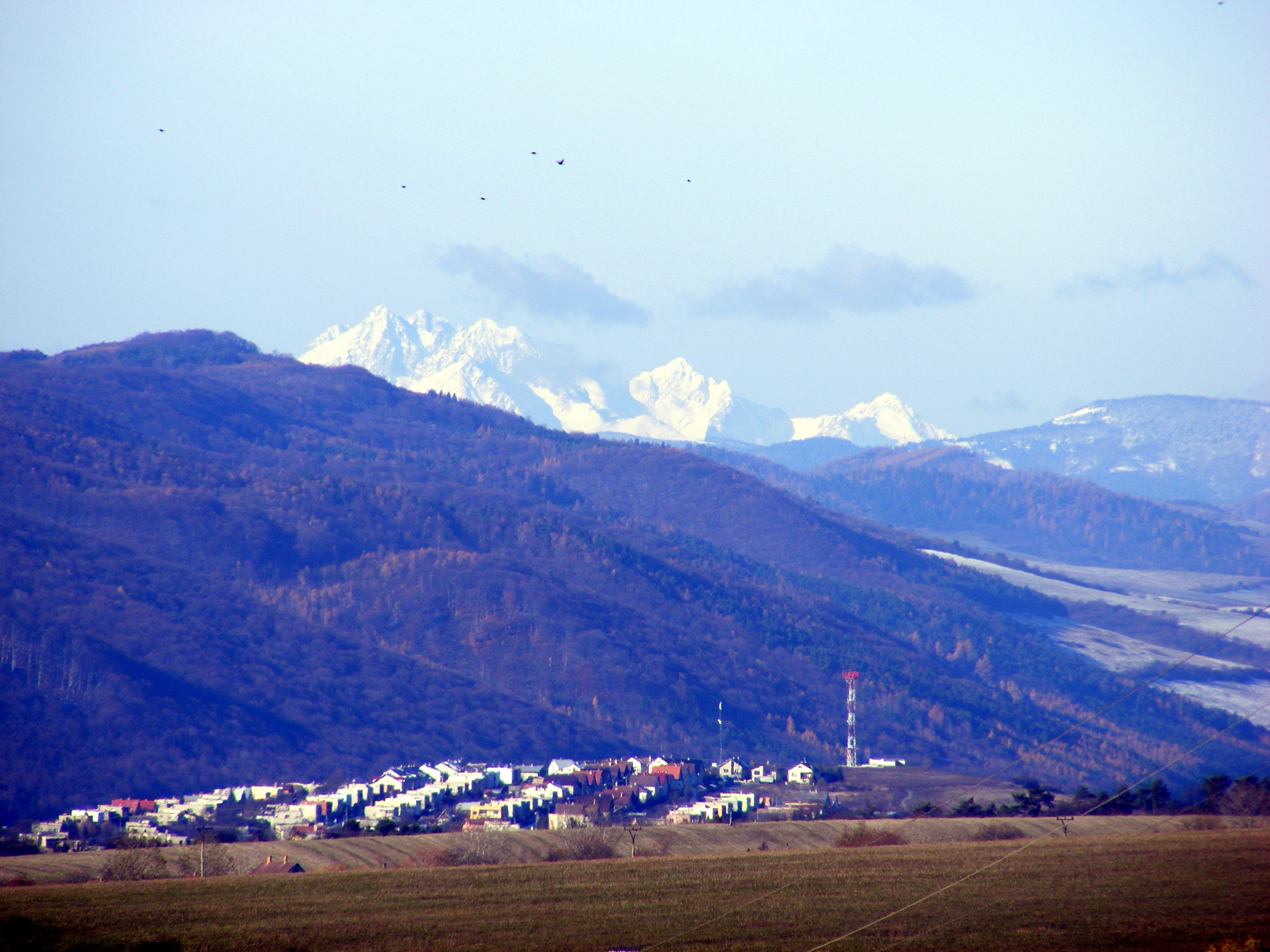 Pohľad na Sabinov z východu, v pozadí Vysoké Tatry